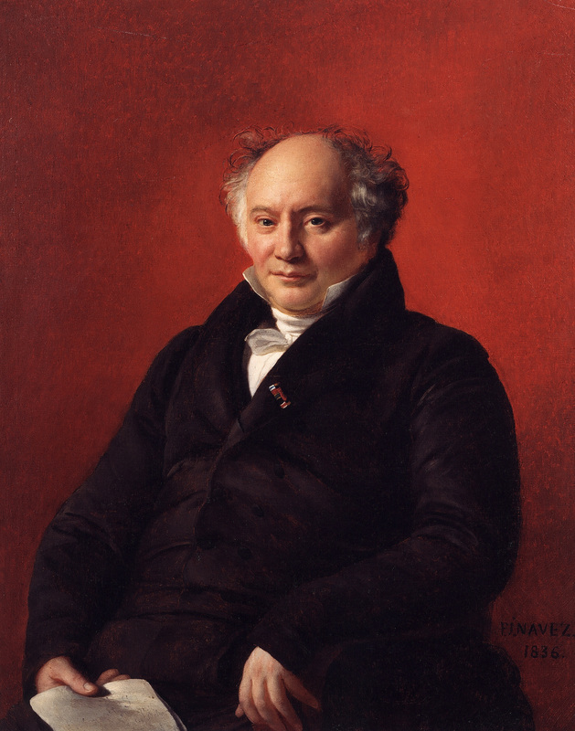 Baron de Stassart, président du Sénat